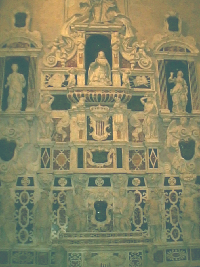 Mausoleo di Martino II d'Aragona (XVII secolo) Cattedrale di Cagliari